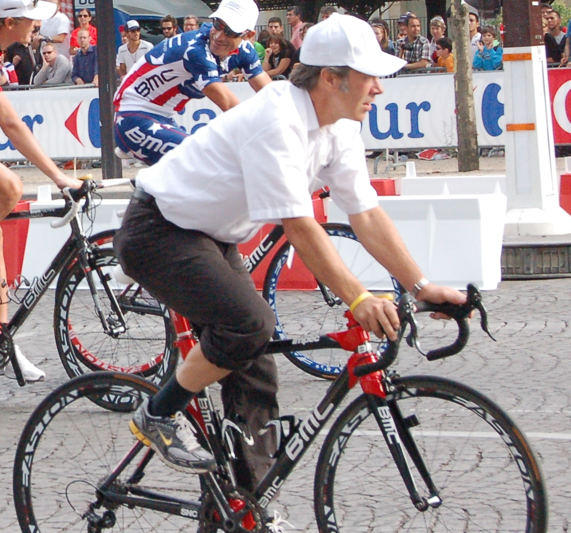 Jim Ochowicz, lors de la dernière étape du Tour de France 2010, sur les Champs Élysées